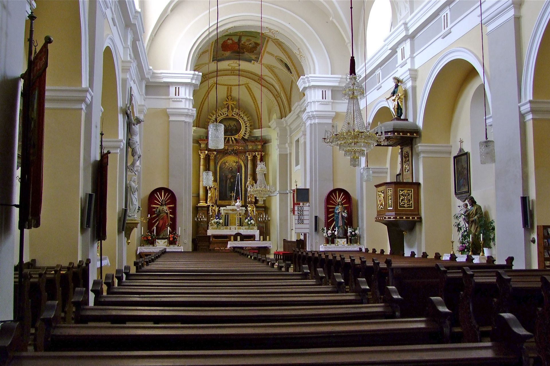 Kath. Pfarrkirche hl. Jakobus d. Ä.